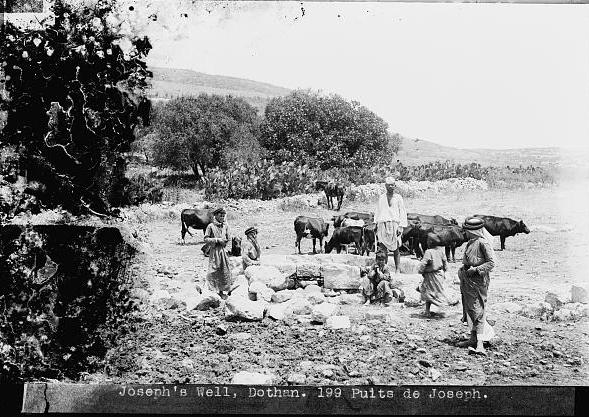 כותר מקורי: Joseph's Well, Dothan